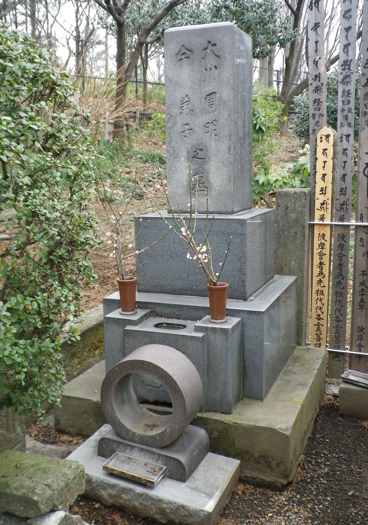 大川周明の墓